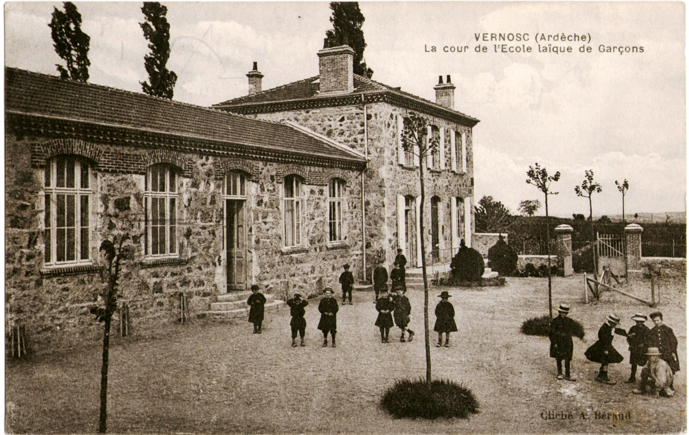 Vernosc école publique cour